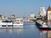 Kai 4 und Kai 5 bayernhafen Bamberg